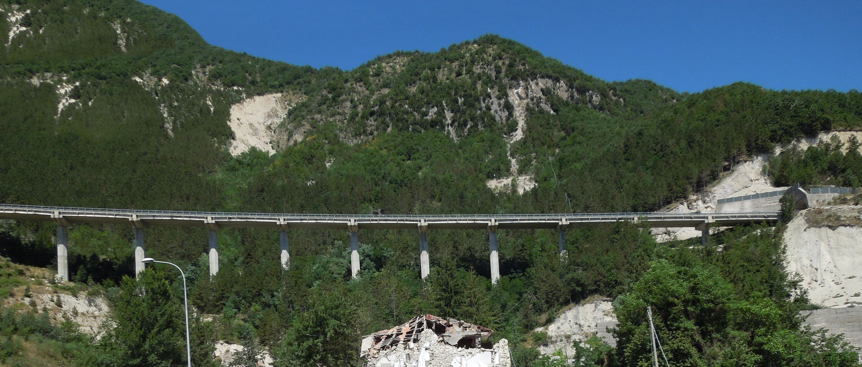 Viadotto della strada statale 685 Tre Valli Umbre fotografato da Pescara del Tronto